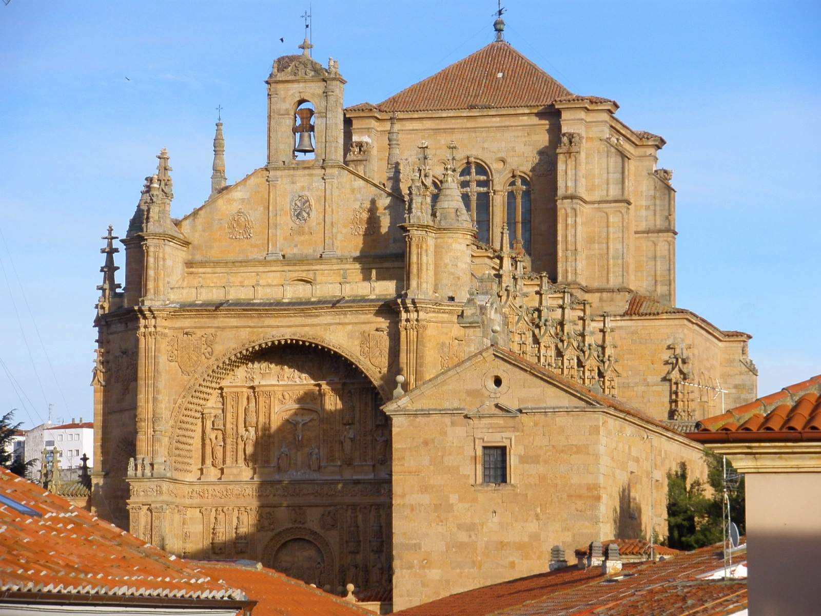 Salamanca - Convento de San Esteban, fachada occidental